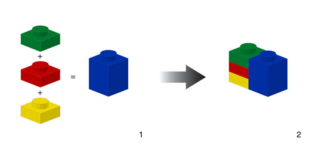 высота кирпичиков Lеgo